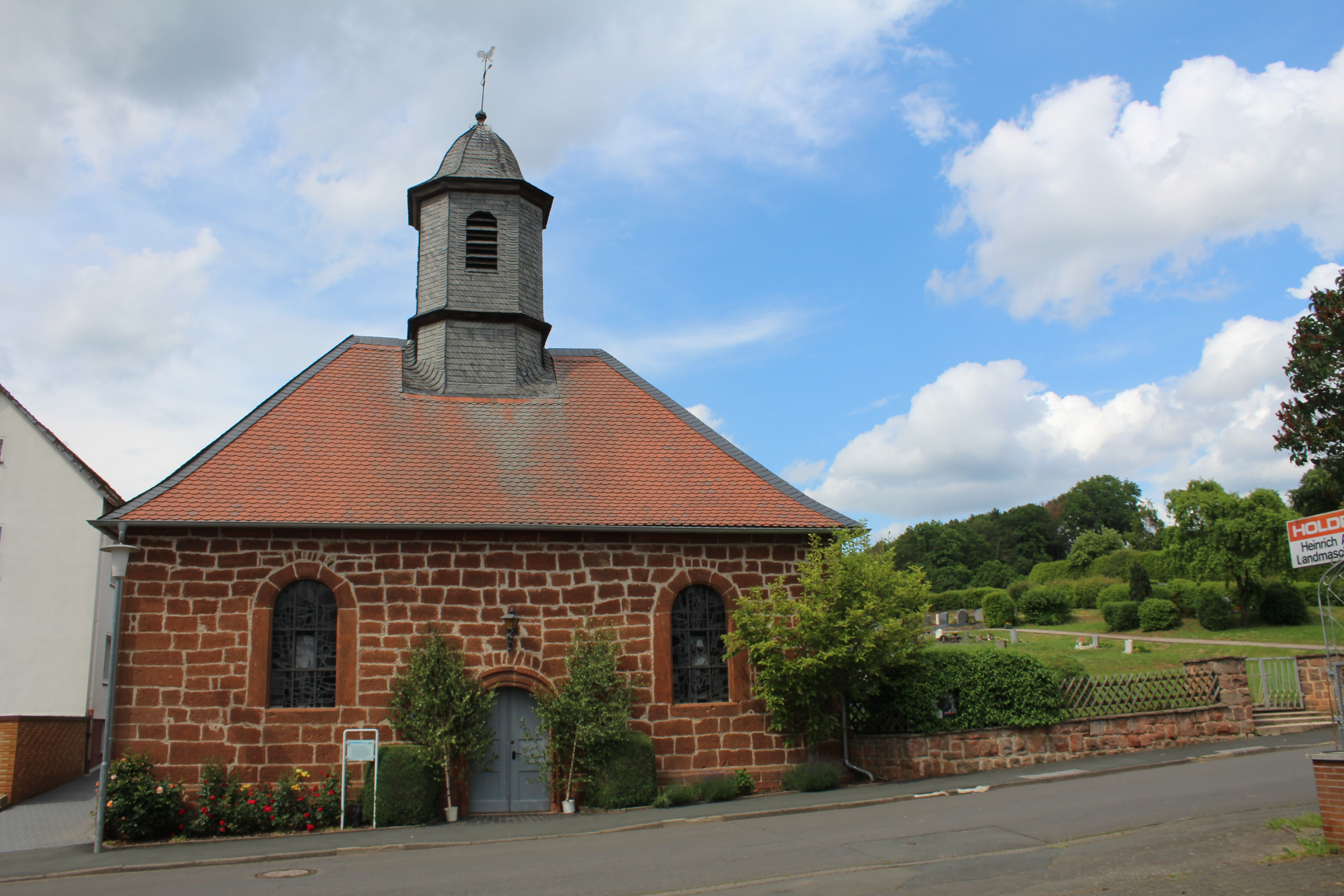 Evangelische Kirche Todenhausen, Wetter, Landkreis Marburg-Biedenkopf, Hessen, Deutschland